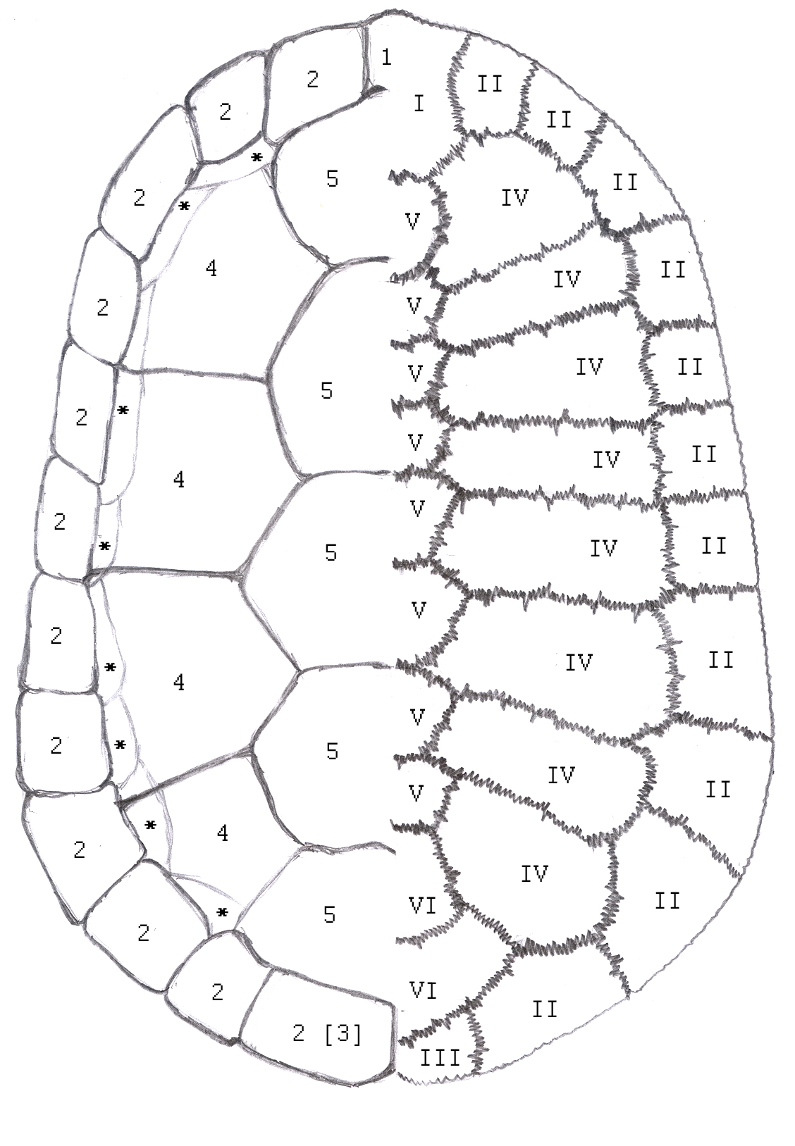 Own draft-scheme on carapax in Testudines, combining information about scutes and bones. Схема на роговите щитчетата и костите на карапакса при Костенурки.